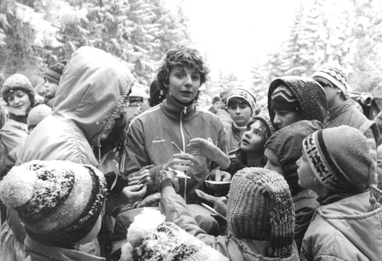 Steffi Martin ADN-ZB Schaar 5.1.1985-Bez. Suhl: Vorschaumotiv zu den XXIV. Weltmeisterschaften im Rennschlittensport vom 21. bis 28. Januar 1985 in Oberhof-Als Titelverteidigerin geht die 22jährige Olympiasiegerin Steffi Martin (SC Traktor Oberwiesenthal) an den Start. Wie bei den DDR-Meisterschaften 1985 (Foto), die bereits am 29.-30.12.1984 auf der WM-Bahn ausgetragen wurden, wird sie auch bei den Welttitelkämpfen von jungen Autogrammjägern umringt sein.